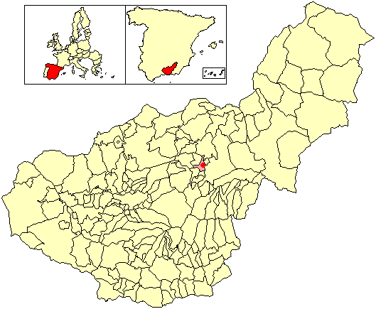 Situación de la localidad de El Bejarín (en el municipio de Purullena) respecto a la provincia de Granada, en España.